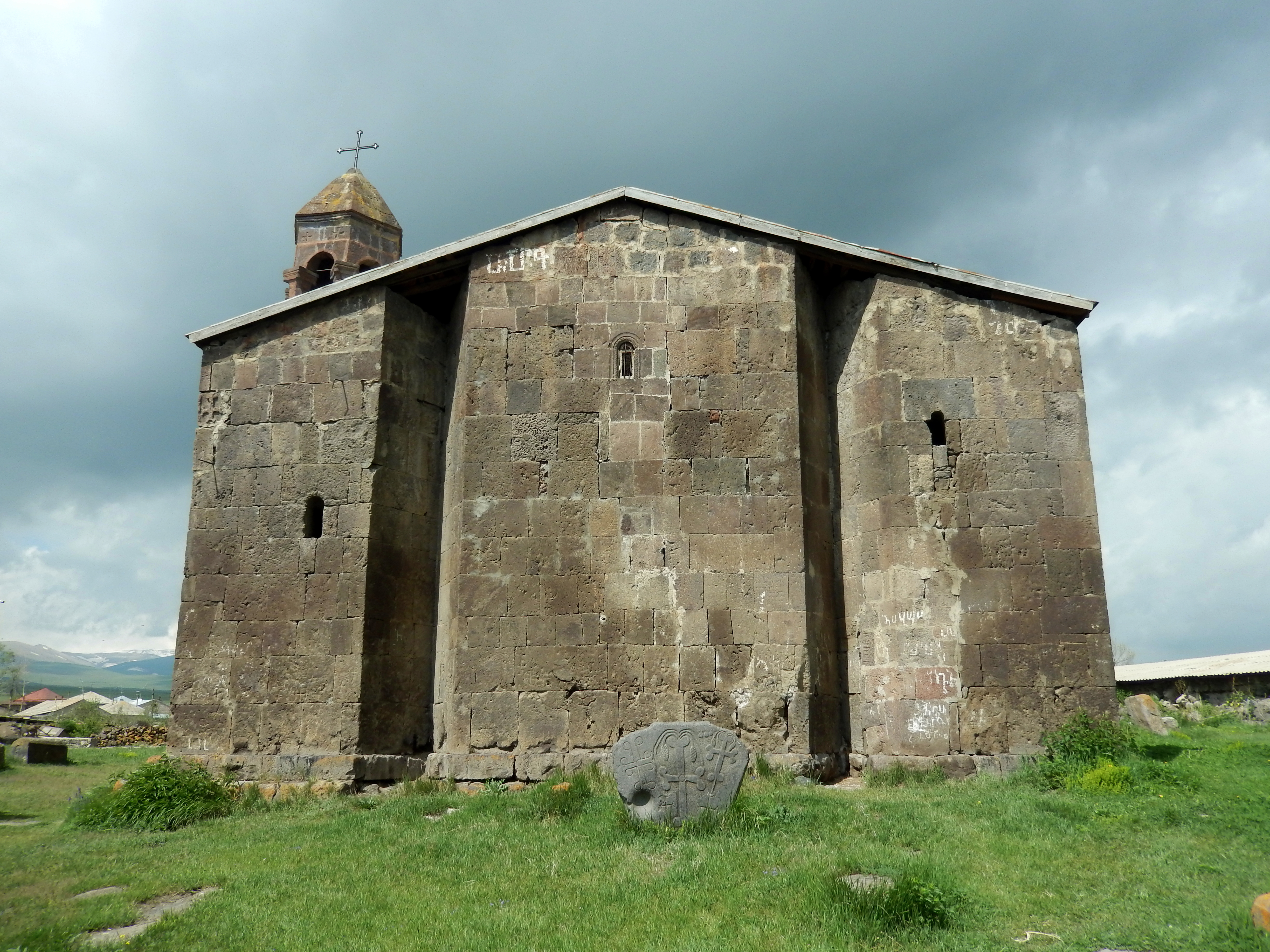 Սուրբ Գևորգ, Գանձակ գյուղ, Գեղարքունիքի մարզ